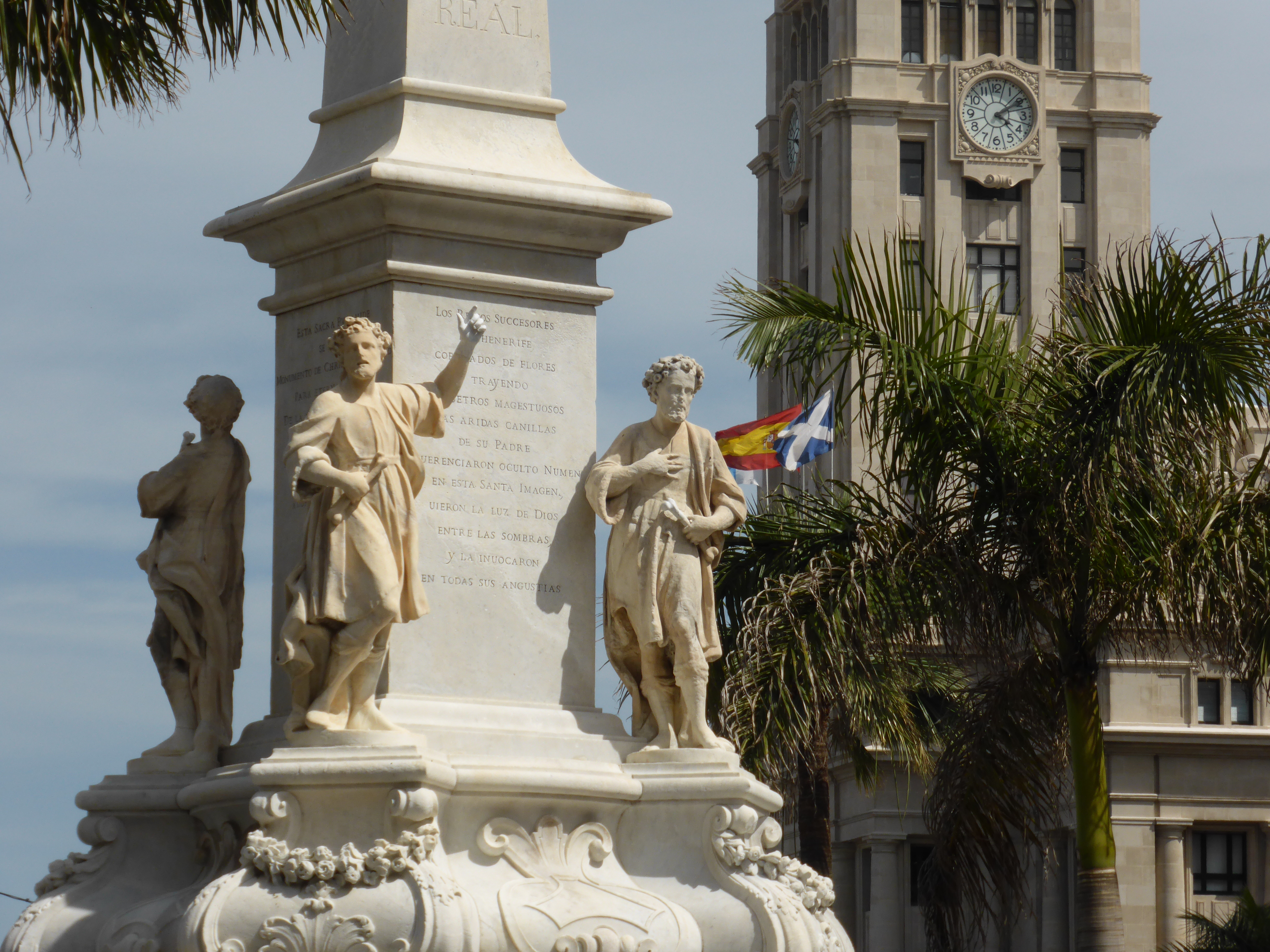 Esculturas de los guanches, en el monumento Triunfo de la Candelaria, en la plaza de la Candelaria, de Santa Cruz de Tenerife. Al fondo, a la derecha, se ve la torre del reloj del Cabildo Insular de Tenerife, en la Plaza de España. También se divisan las banderas de Tenerife y España.